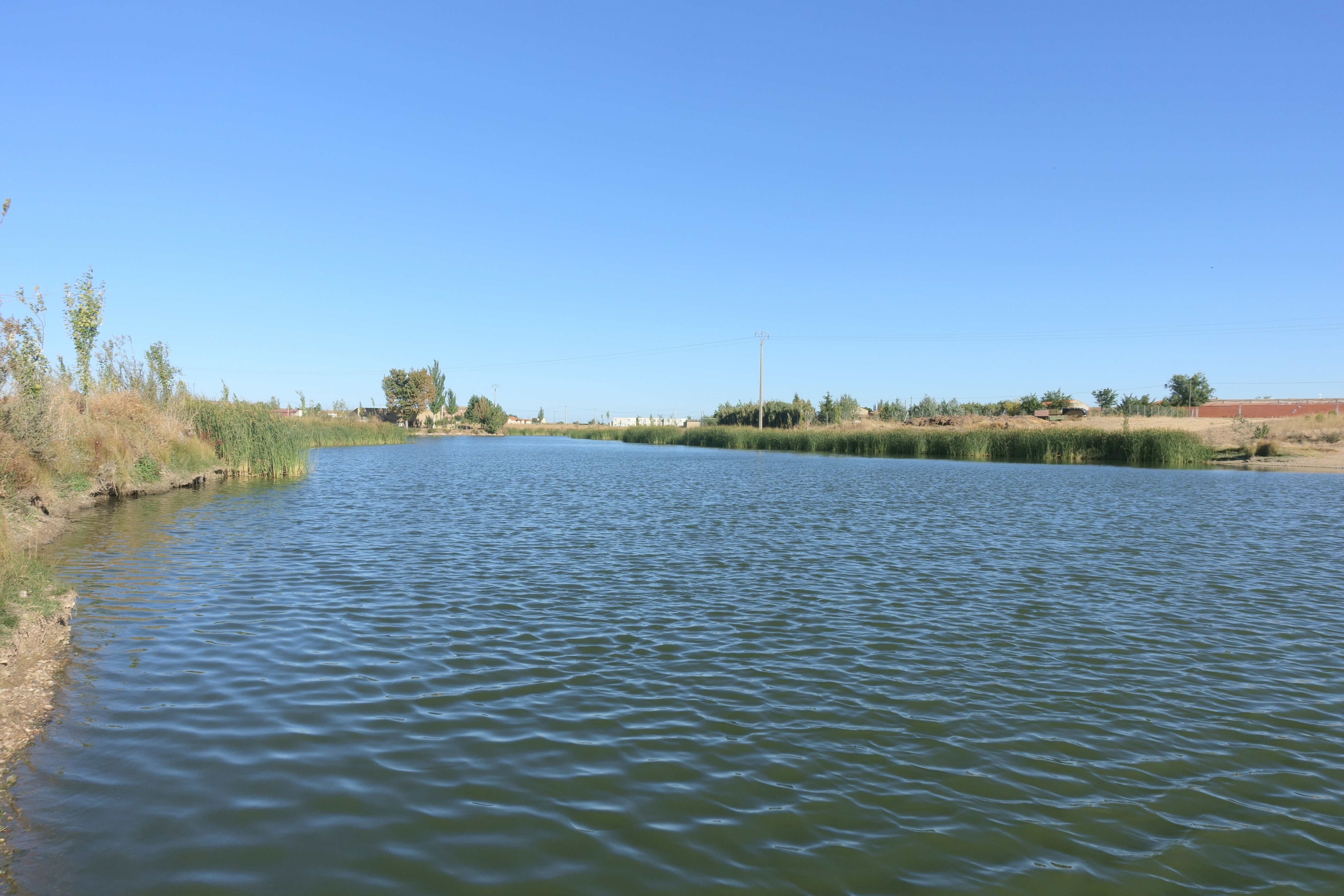 Laguna Grande, Manganeses de la Lampreana (Zamora, España).